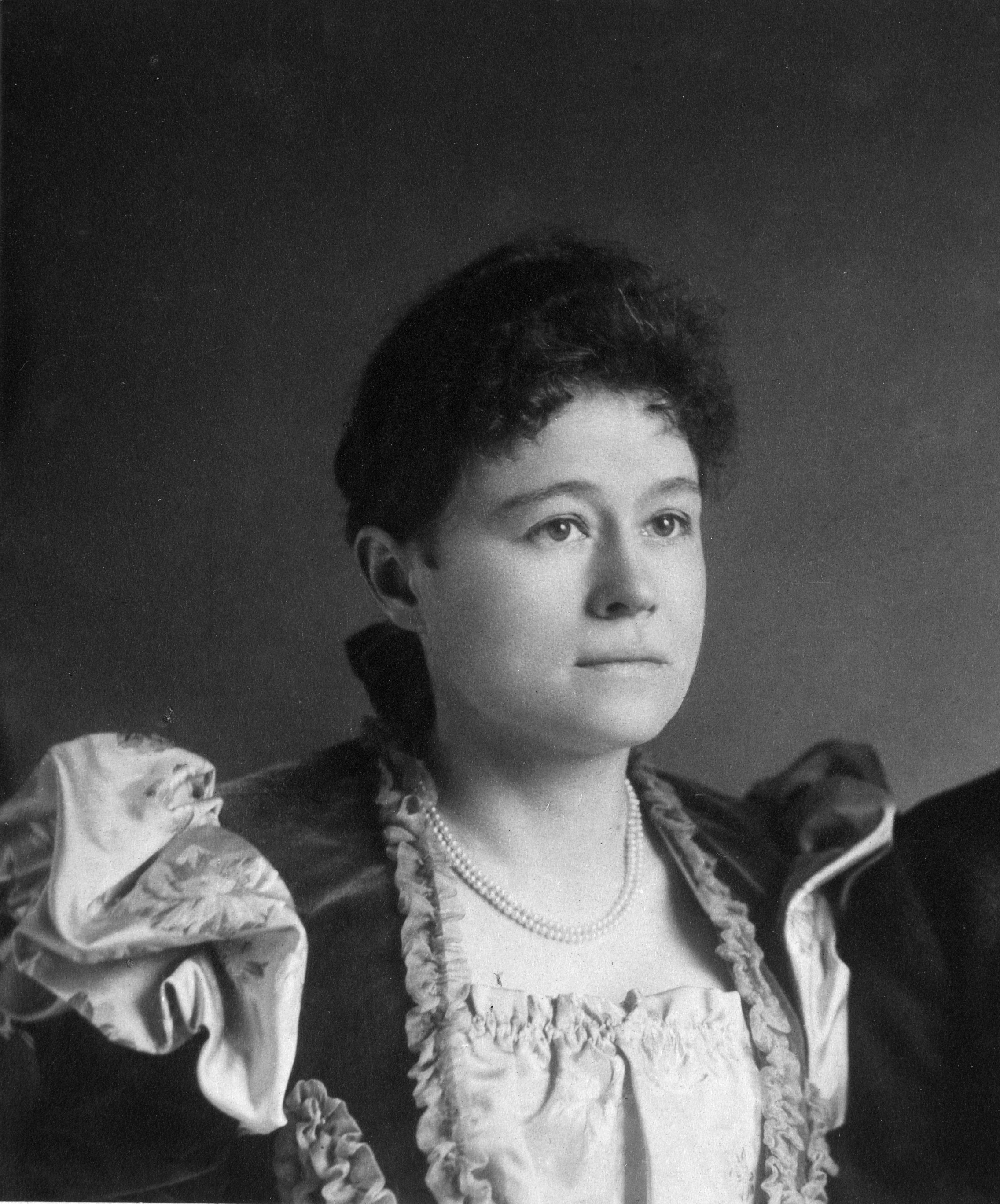 Eva Nansen